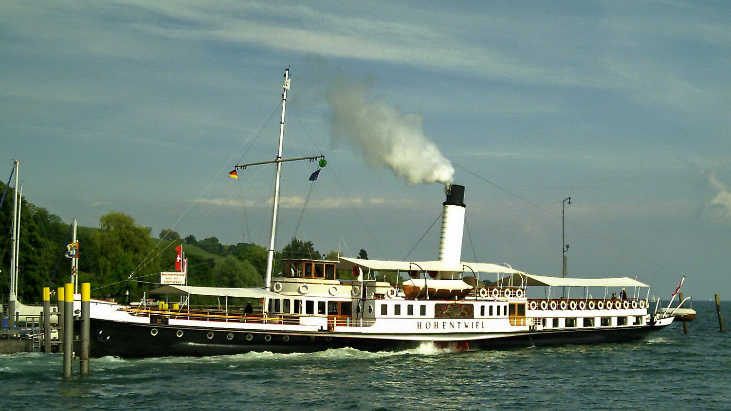 Bodensee-Dampfschiff Hohentwiel von 1913 Im Jahre 1911 hatte die Königlich Württembergische Dampfschifffahrt (KWD) einen Bestand von 6 Dampfschiffen. In diesem Jahr bestellte die KWD bei Escher Wyss & Cie in Zürich ein Dampfschiff nach dem Typ des letzten Neubaus, des 1909 erbauten Dampfschiffes FRIEDRICHSHAFEN. Das Schiff wurde unter der Baunummer 576 begonnen und erhielt nach dem als württembergischer Exklave im Hegau gelegenen Vulkankegel den Namen Hohentwiel. Buchstäblich fünf Minuten vor zwölf, im Oktober 1984 wurde die Vereinigung Internationales Bodensee-Schiffahrtsmuseum gegründet. Mit einer Handvoll Gründungsmitgliedern, ein "paar Mark" in der Tasche und einer unerschütterlichen Ausdauer begann das "Abenteuer Hohentwiel". Besonders zweier Männer, den "geistigen Vätern" der HOHENTWIEL, ist es zu verdanken, dass der letzte Raddampfer auf dem Bodensee nicht verloren ging: Dem Altlandrat Klaus Henninger aus Lindau und dem Projektleiter Schiffsing. Reinhard E. Kloser aus Hard in Vorarlberg. Eigner des Dampfschiffes »Hohentwiel« ist der Verein “Internationales Bodensee-Schifffahrtsmuseum e.V.“ mit Sitz in Bregenz / Österreich. Der Betrieb des Schiffes liegt in den Händen der »Hohentwiel« Schiffahrtsgesellschaft m.b.H. mit Sitz in Hard, im Folgenden kurz HSG genannt. Ständiger Heimathafen ist ebenfalls Hard; das Schiff führt deshalb die österreichische Flagge.